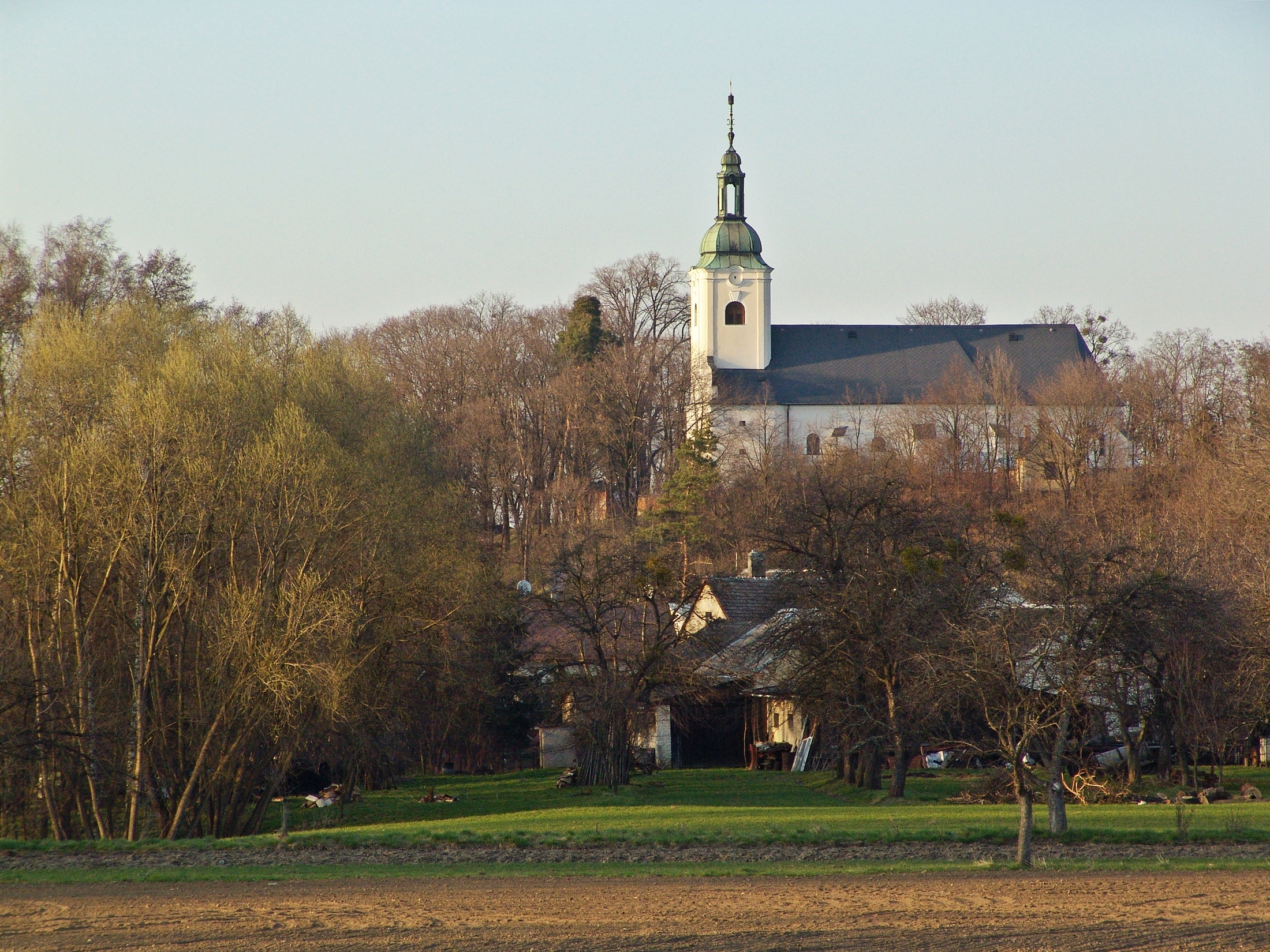 Kostel svatých Petra a Pavla, Pavlovského, Jaktař, Opava.